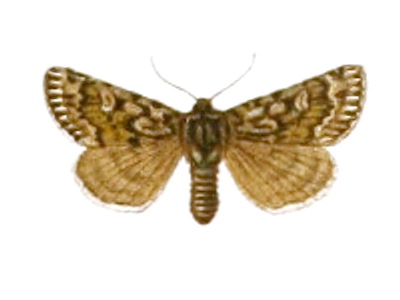 Schöyenia [sic] quieta Hbn. = Xestia quieta (Hübner, [1813])